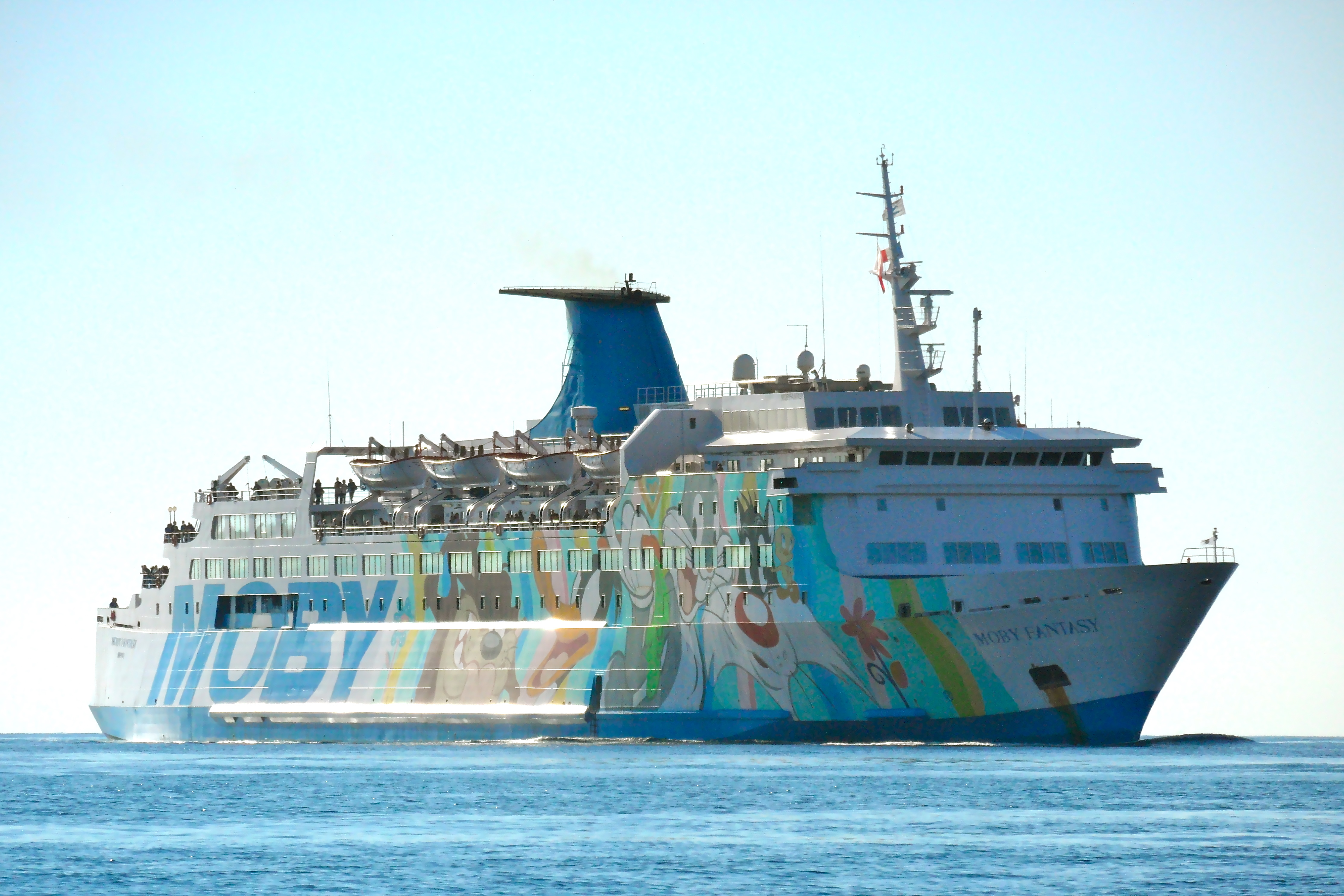 le Moby Fantasy en approche de Bastia